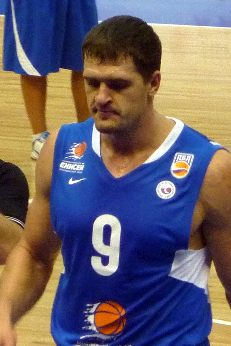 Нападающий красноярского Енисея Денис Беляев в матче против БК «Нижний Новгород» 18 декабря 2010 года